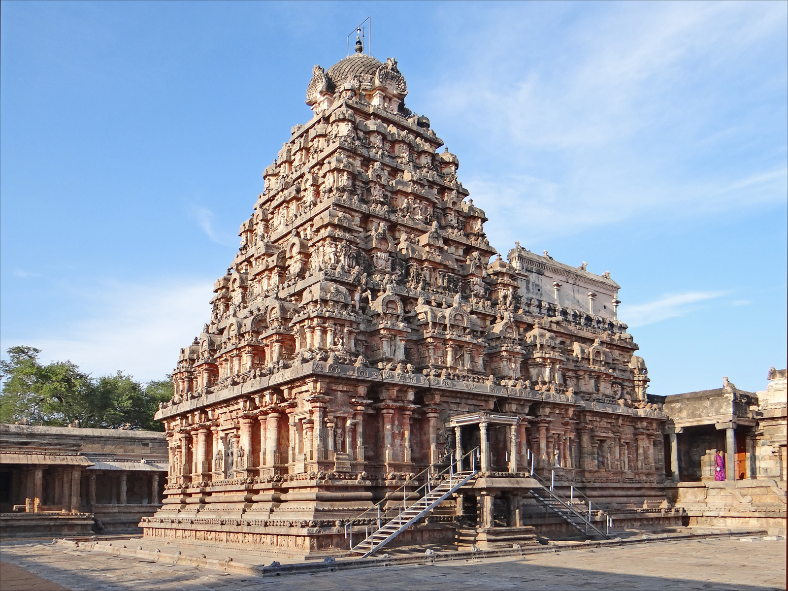 Airavatesvara Temple is a Hindu temple of Dravidian architecture located in the town of Darasuram, near Kumbakonam in the South Indian state of Tamil Nadu. This temple, built by Rajaraja Chola II in the 12th century CE is a UNESCO World Heritage Site, along with the Brihadeeswara Temple at Thanjavur, the Gangaikondacholisvaram Temple at Gangaikonda Cholapuram that are referred to as the Great Living Chola Temples. Le sanctuaire du temple d’Airavateshwara à Darasuram, vu du coté sud-ouest avec sa tour pyramidale (vimana) construite au-dessus du Garbha griha (Sreekovil) où se trouve le Lingam. Les hindous peuvent accéder au sanctuaire par l'escalier métallique Le temple est entourée d'une galerie à portique. Les grands temples vivants de la dynastie des Chola, classés sur la liste du patrimoine mondial de l'UNESCO, datent des XIe et XIIe siècles, ce sont : le temple de Brihadisvara de Thanjavur, le temple de Brihadisvara de Gangaikondacholisvaram et le temple d’Airavatesvara (Airavateshwara) de Darasuram. Ils sont situés dans l'Etat du Tamil Nadu en Inde du sud. Ces temples, caractéristiques de l'art dravidien médiéval tardif, témoignent des brillantes réalisations de l’ère Chola en architecture, peinture, sculpture et statuaire en bronze. Le temple d’Airavatesvara, érigé par Rajaraja II (1150-1175) à Darasuram, comporte un vimana de 24 m, il est dédié à Shiva. Le complexe du temple d’Airavatesvara a été entièrement construit en une seule fois, sans que des structures soient ajoutées ultérieurement, et il a gardé sa forme originelle. Comme les autres temples, il possède de nombreuses sculptures d'une grande qualité (extraits du site de l'UNESCO)